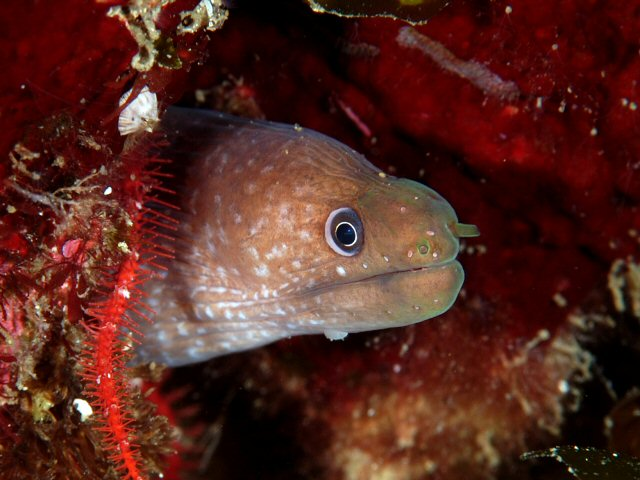 カナリーモレイ(Gymnothorax bacalladoi)